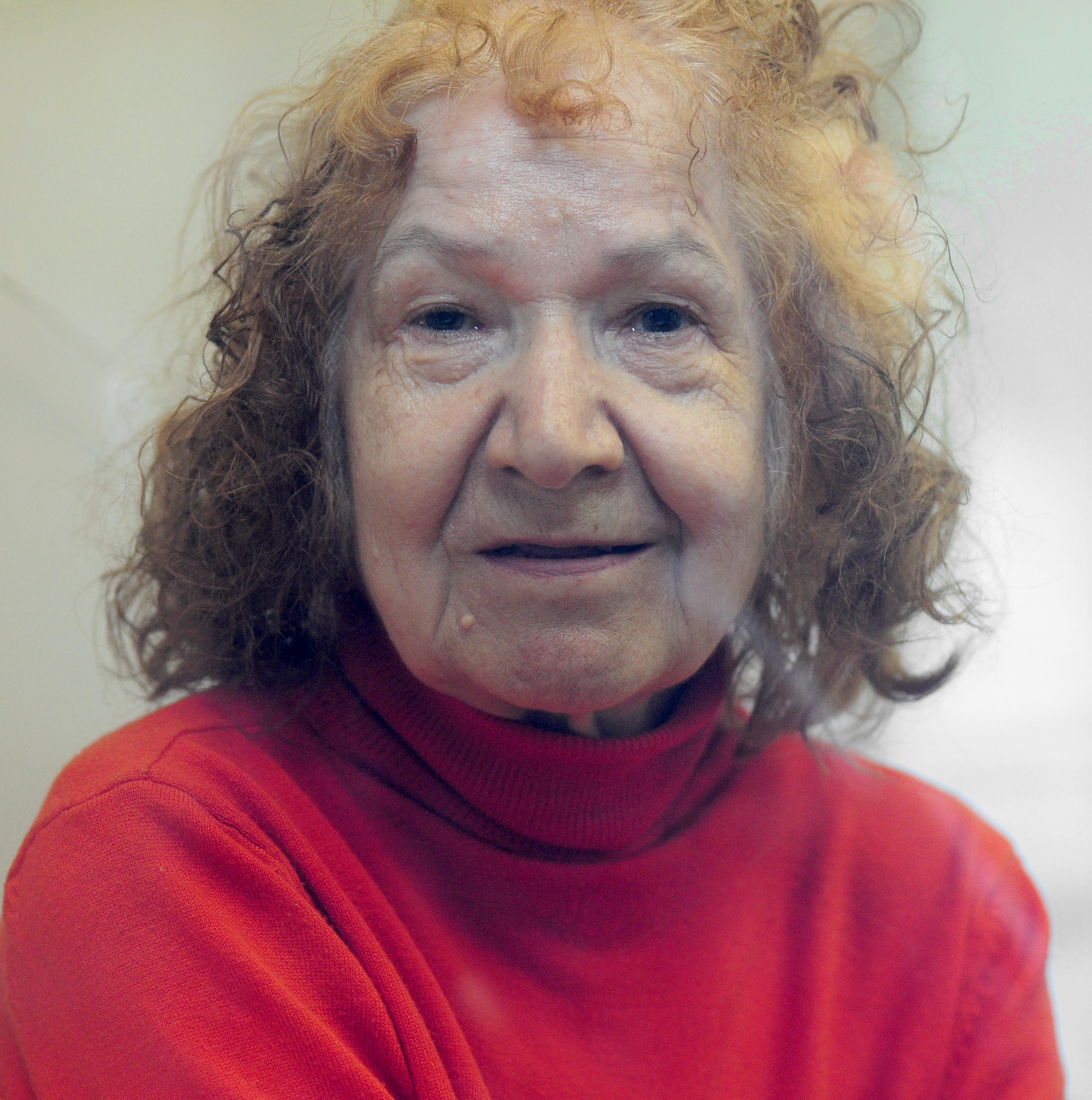 Тамара Самсонова во Фрунзенском районном суде Санкт-Петербурга, 2015.